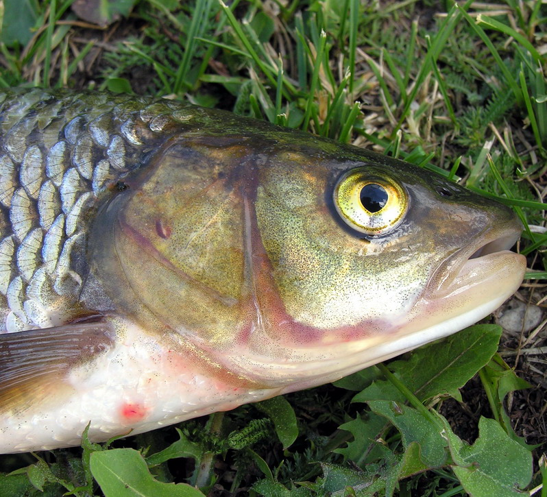 Šapalas (Leucisus cephalus) Šeima. Karpinės (Cyprinidae) Foto: Algirdas, 2006 m. liepos 1 d., Lietuva